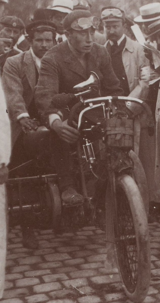 [Collection Jules Beau. Photographie sportive] : T. 27. Année 1904 / Jules Beau : F. 23v. Circuit des Ardennes, Arlon, 24 juillet 1904